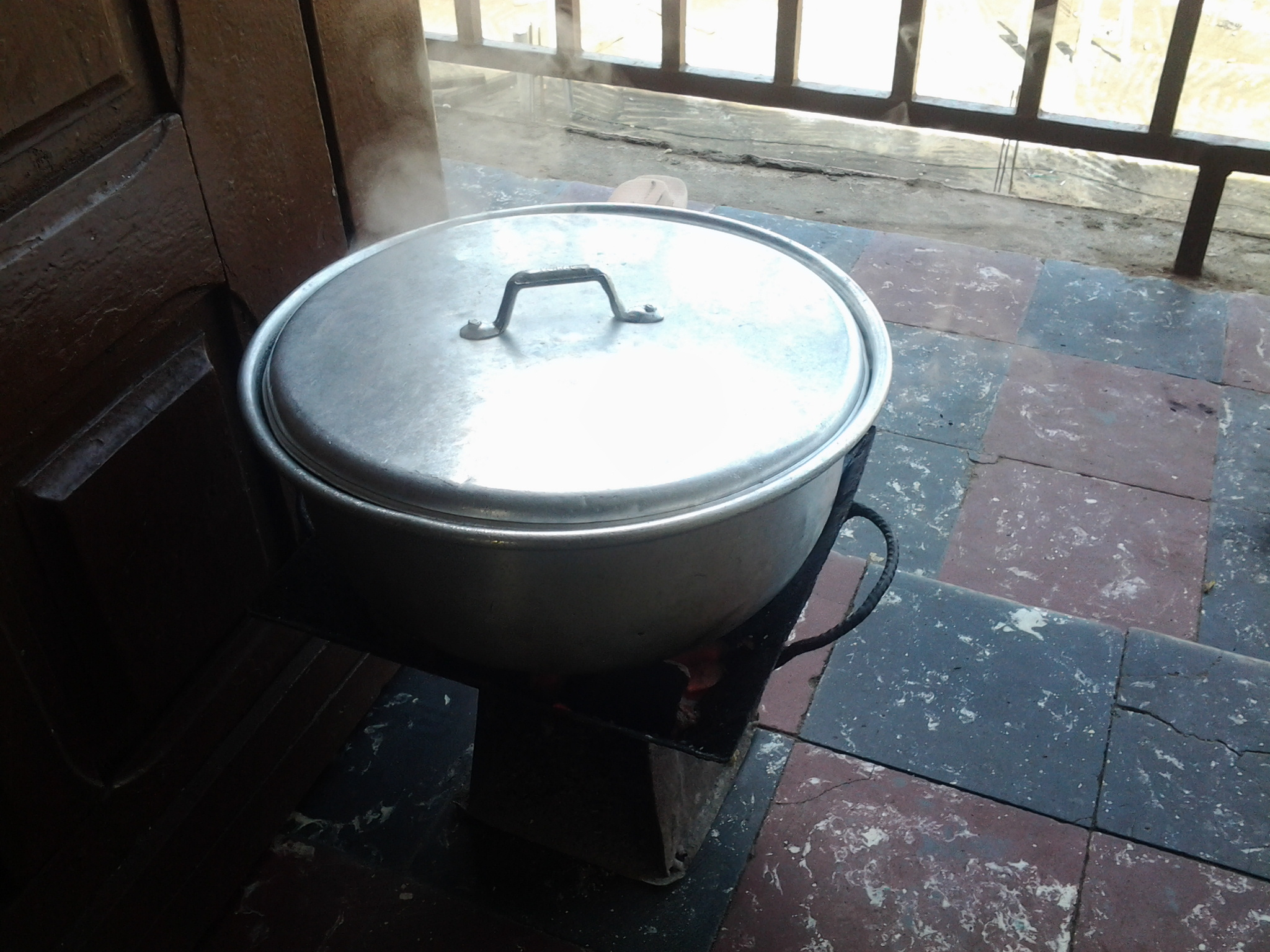 Casserole sur un fourneau de charbon pour la cuisson d'une sauce. This is an image of food from Ivory Coast